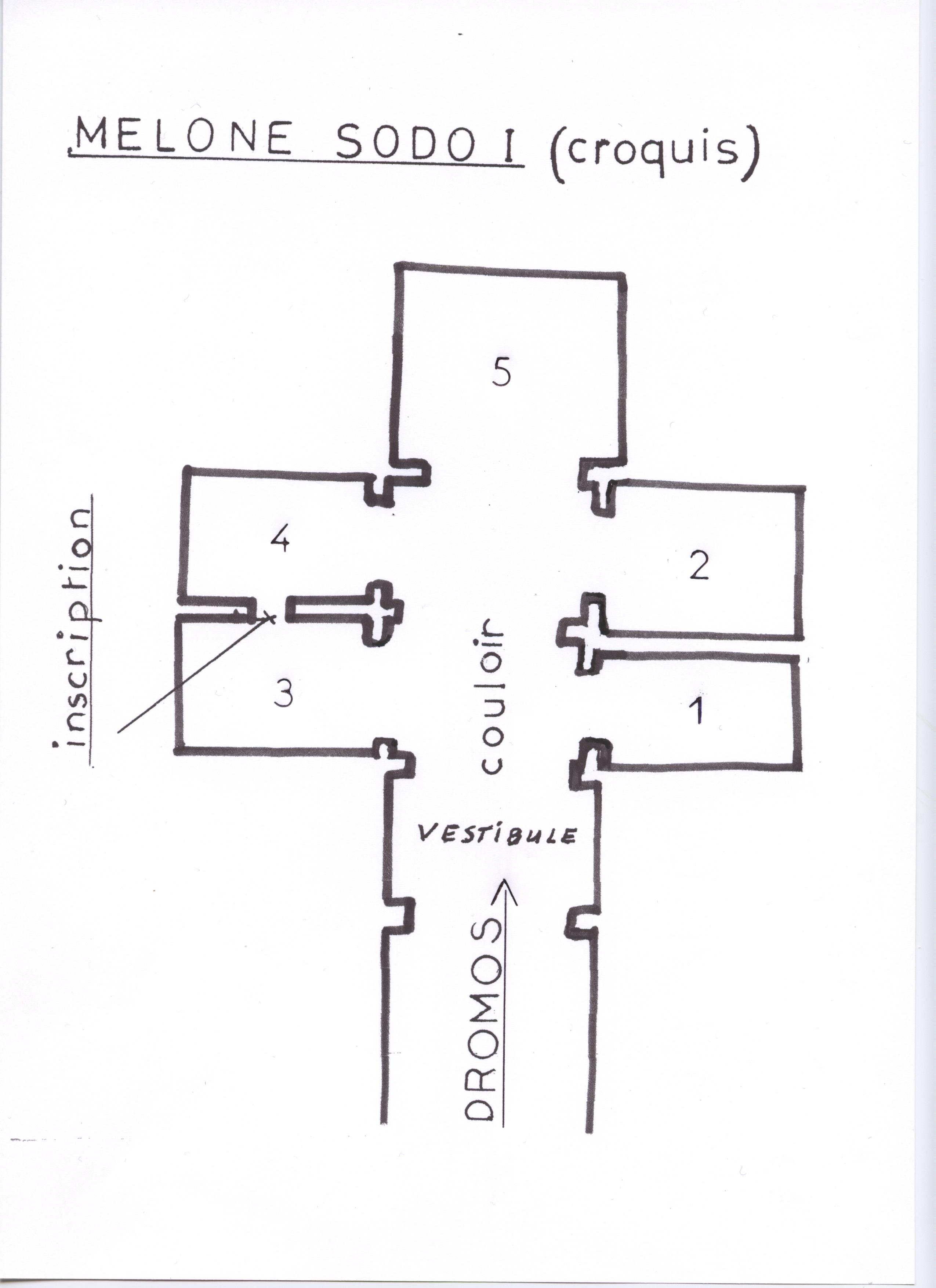 Croquis de la nécropole Melone Sodo I, Cortone, Toscane, Italie.